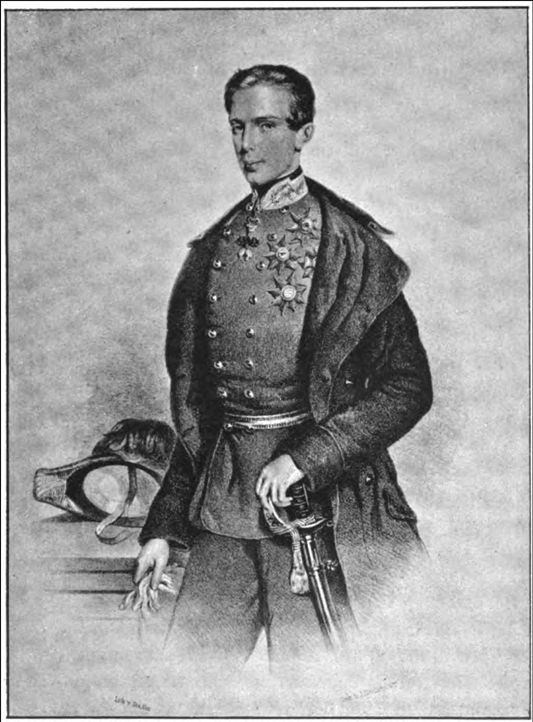 Karl Ludwig von Österreich, Statthalter in Tirol